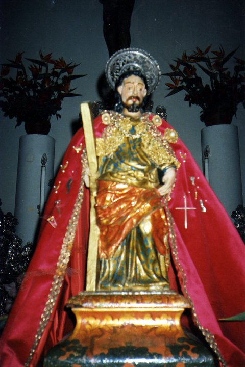 Imagen de San Andrés Apóstol del siglo XVII. Se encuentra ubicada en el pueblo de San Andrés en la isla de Tenerife.